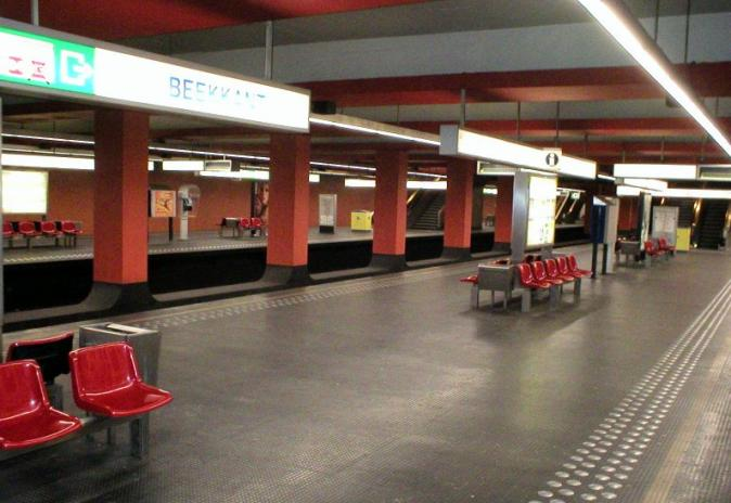 Perrons van het station Beekkant.